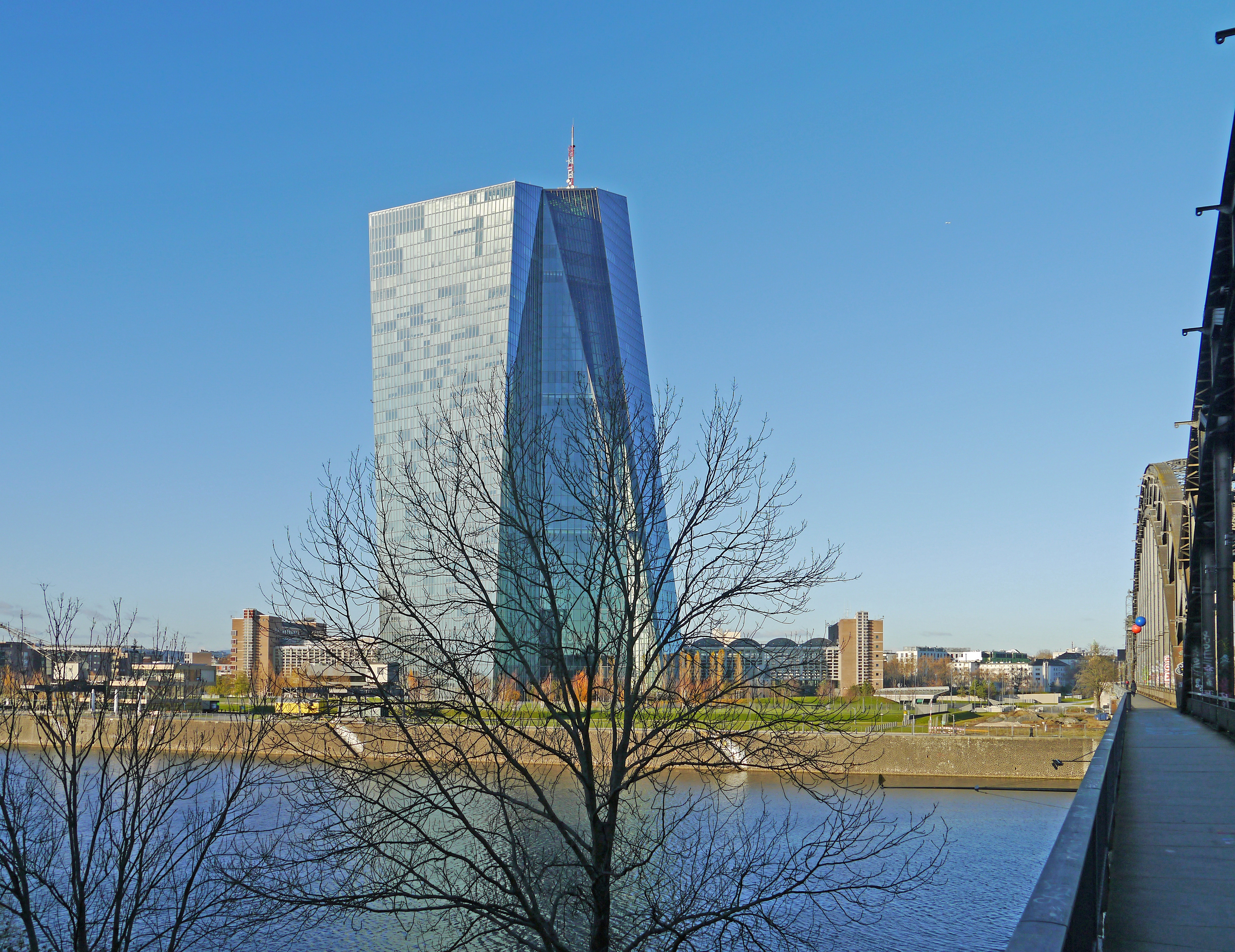 Die EZB-Hauptverwaltungsrückseite, 2016 von der Deutschherrnbrücke.